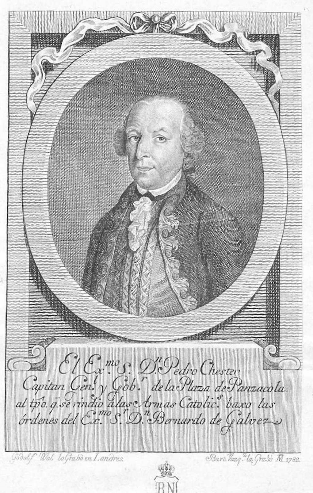 Peter Chester, grabado de Bartolomé Vázquez. Inscripción: "El Exm.º S. Dn. Pedro Chester, Capitán Genl. y Gobr. de la Plaza de Panzacola al tpo. q. se rindió a las armas Católics. baxo las órdenes del Exm.º S. Dn. Bernardo Gálvez". La ficha de la Biblioteca Nacional, donde se conserva la estampa. explica: "En el Archivo de Simancas, Sección de Guerra Moderna, legajo 6.913, folio 67, está, entre otros documentos, la rendición de la plaza de Panzacola tomada por D. Bernardo Gálvez en mayo de 1781. El encabezamiento de la capitulación aclara el cargo que tenía don Pedro Chester y dice así: Artículos de Capitulación combenidos y acordados entre el Señor D. Bernardo de Gálvez, caballero pensionado de la Real y distinguida Orden de Carlos Tercero, mariscal de Campo de los Reales Exércitos de S. M. C. Inspector Superintendente y Governador General de la Provincia de la Luisiana y Comandante General de la Expedición y los Excelentísimos Señores don Pedro Chester escudero, capitán General, Governador, Comandante en Jefe, canziller y vize Almirante por S. M. B. de la Provincia de West Florida y don Juan Campbell, mariscal de Campo y Comandante General". Aparece firmado: Godolf Wal [grabador no identificado] lo Grabó en Londres / Bar Vazqª la Grabó M[adrid] 1782